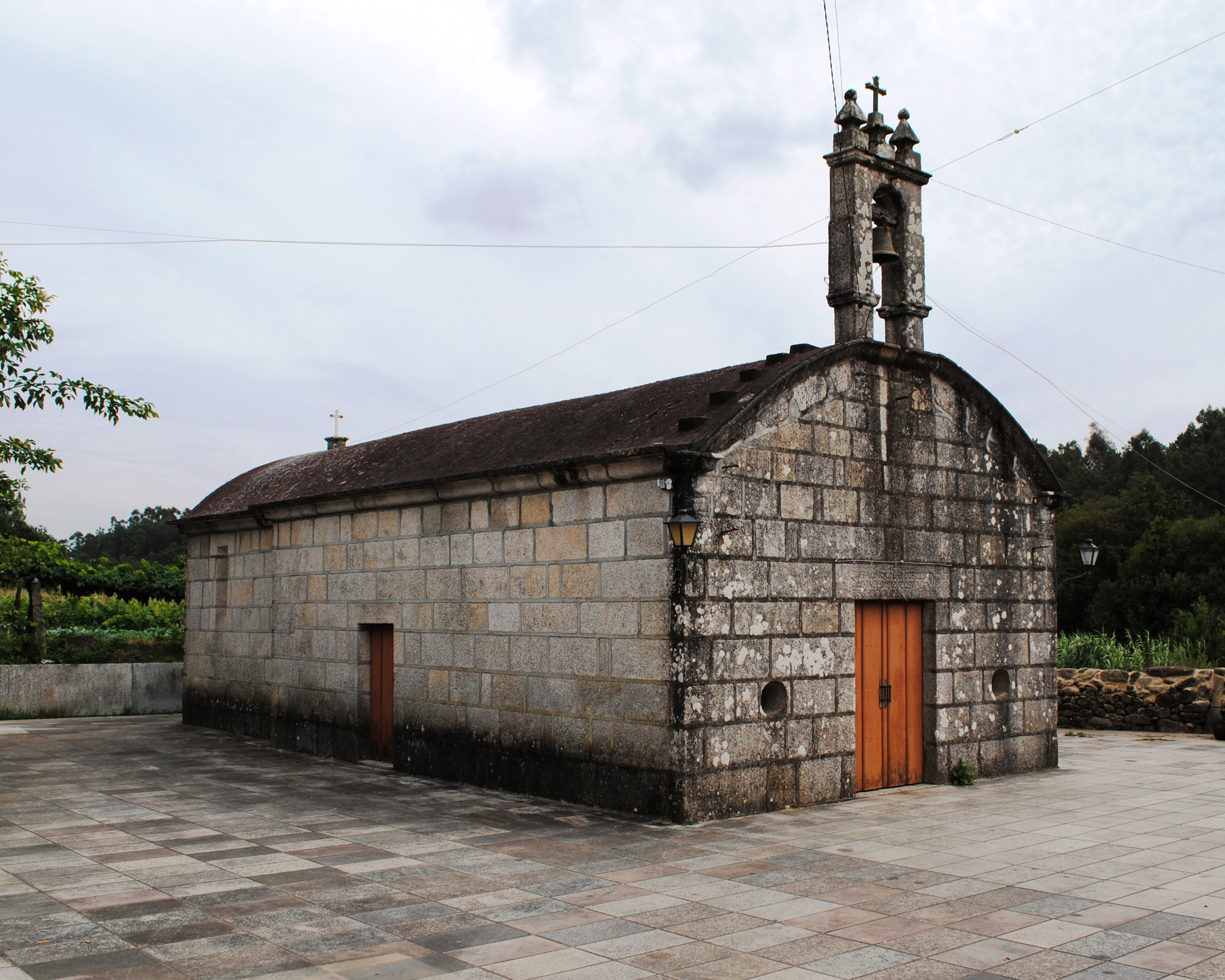 O Porriño, Mosende, capela de S. Diego.